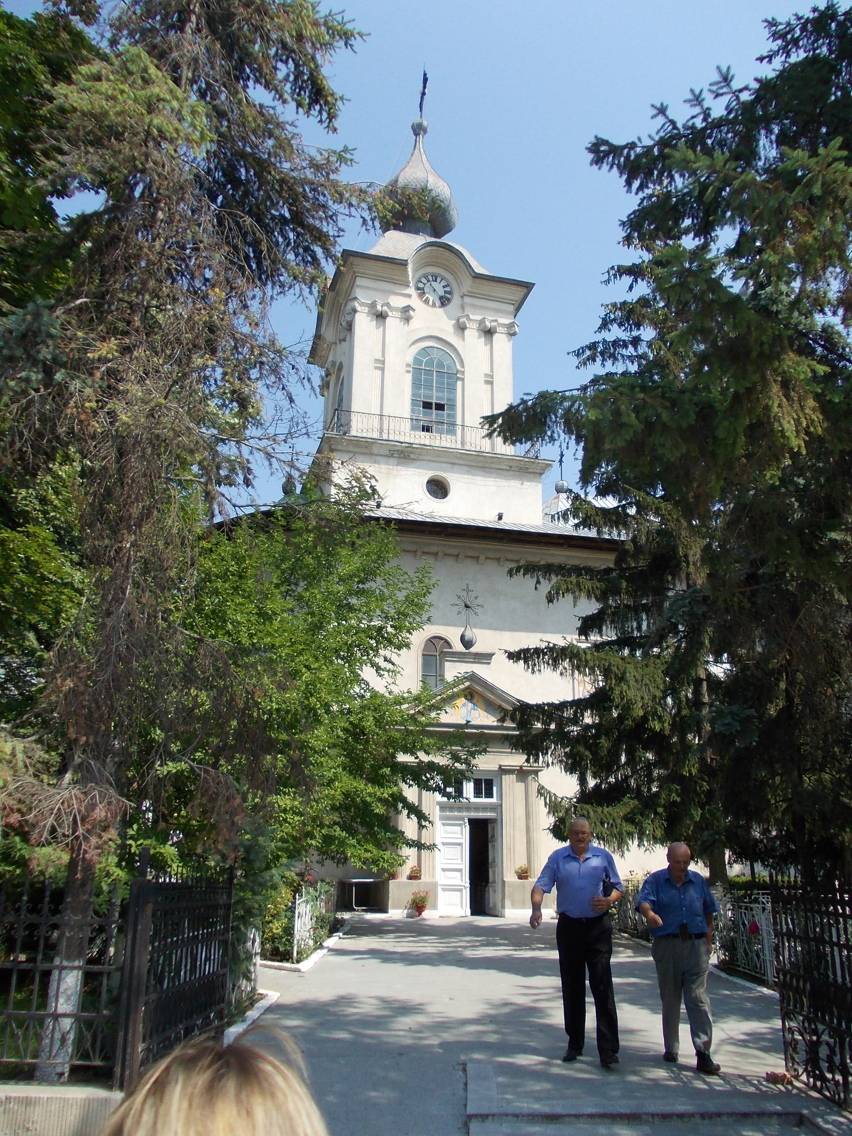 Biserica Uspenia Botoşani